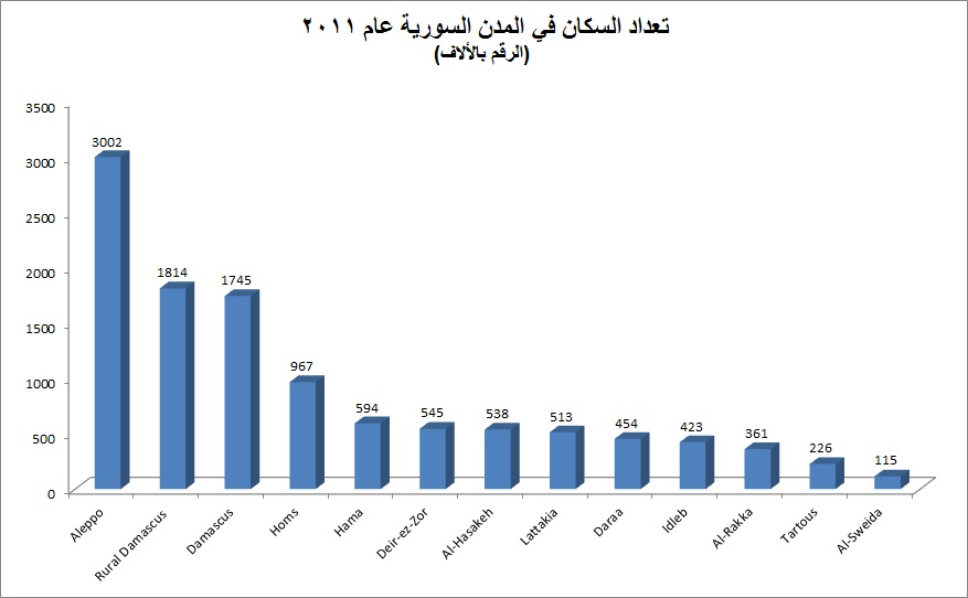 عدد السكان في المحافظات السورية حسب احصاءات المكتب السوري للإحصاء عام ٢٠١١